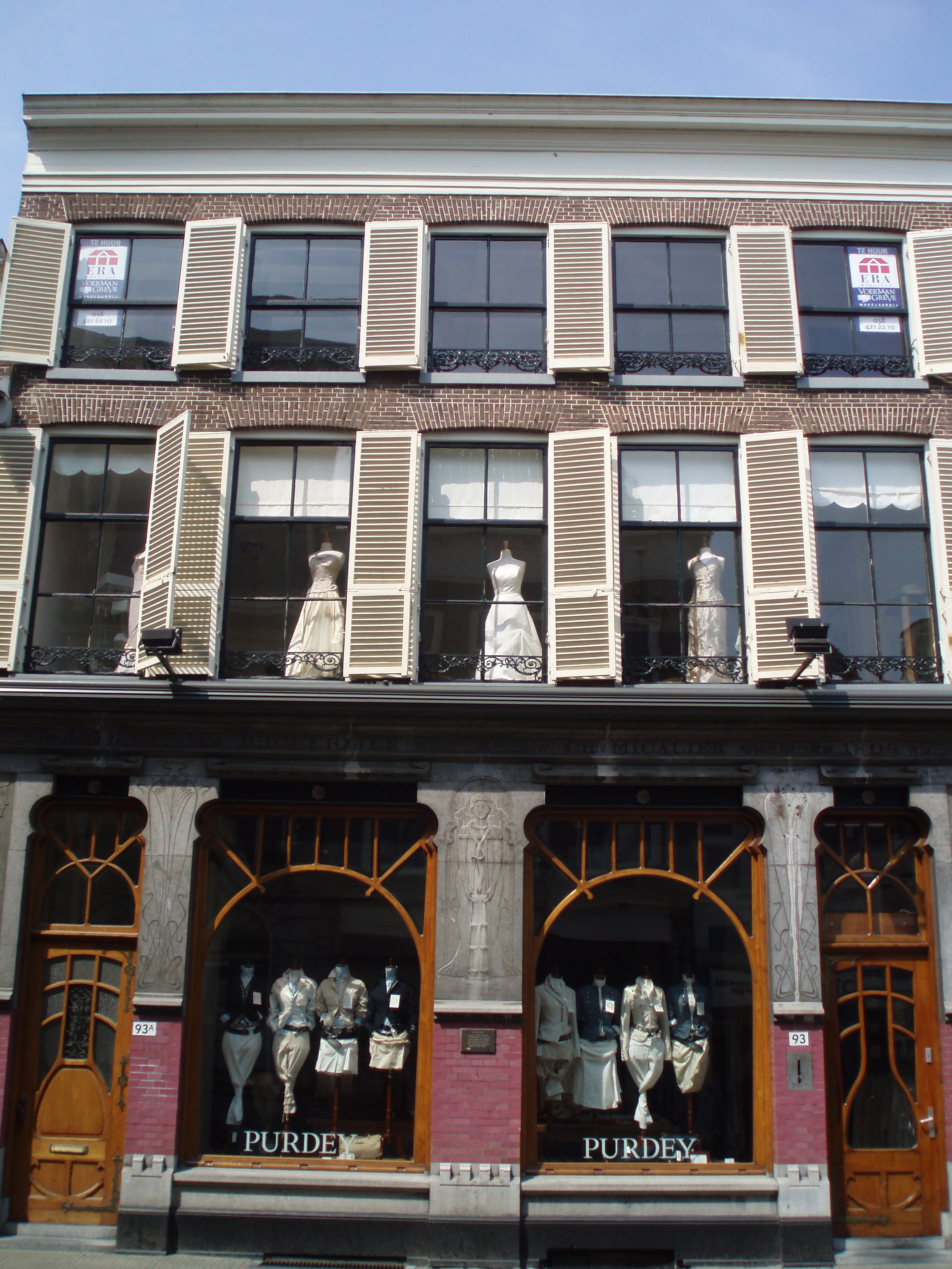 Het Witte Kruis in de Diezerstraat in Zwolle heeft een Jugendstil pui.